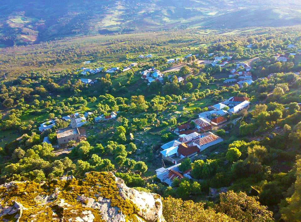 Darrati Zaarora Larache Morocco